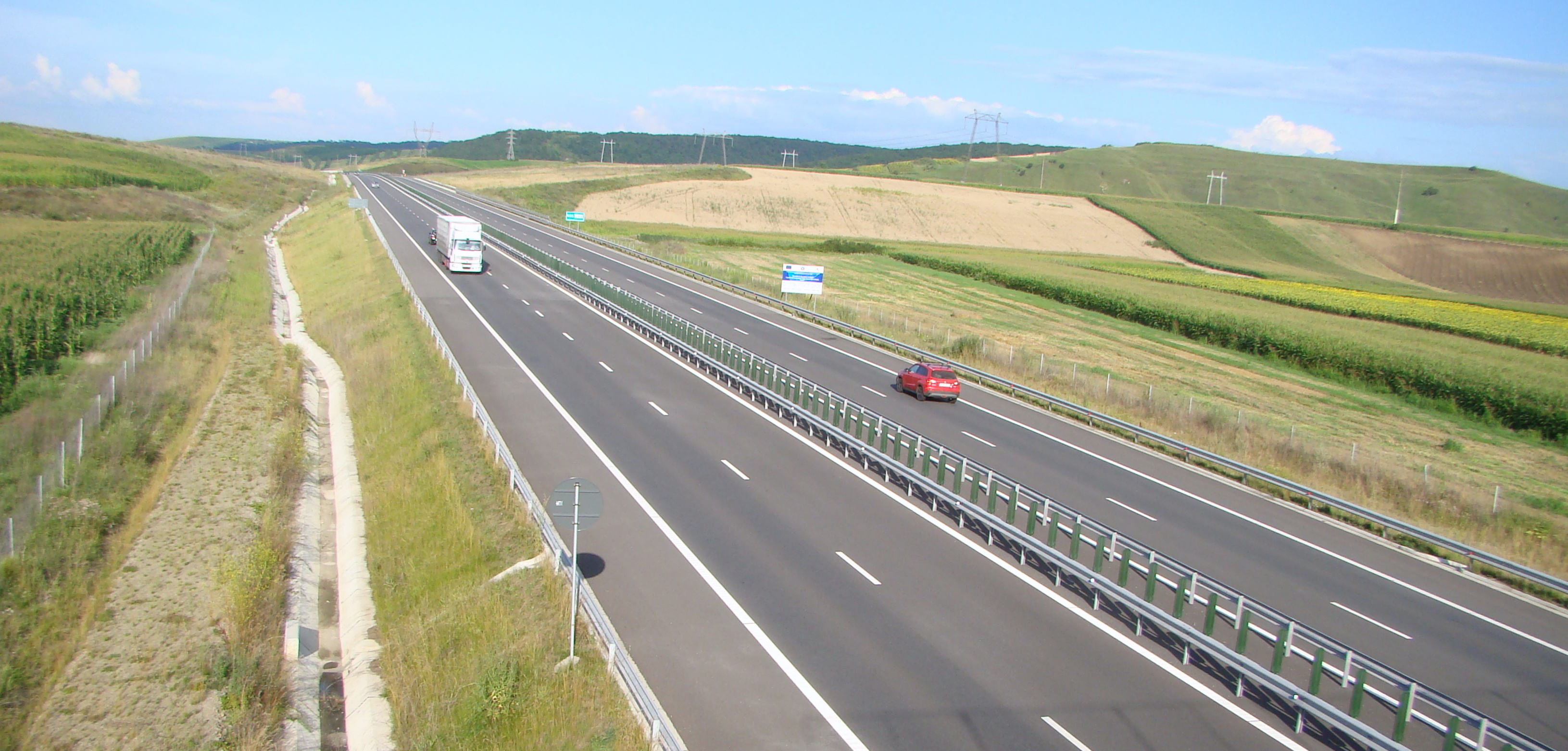 Autostrada A3 la Ogra